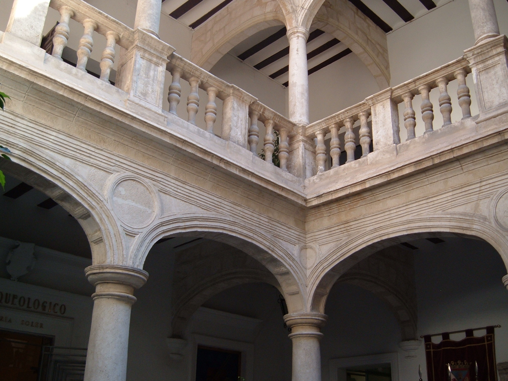 Patio columnado del Palacio Municipal de Villena